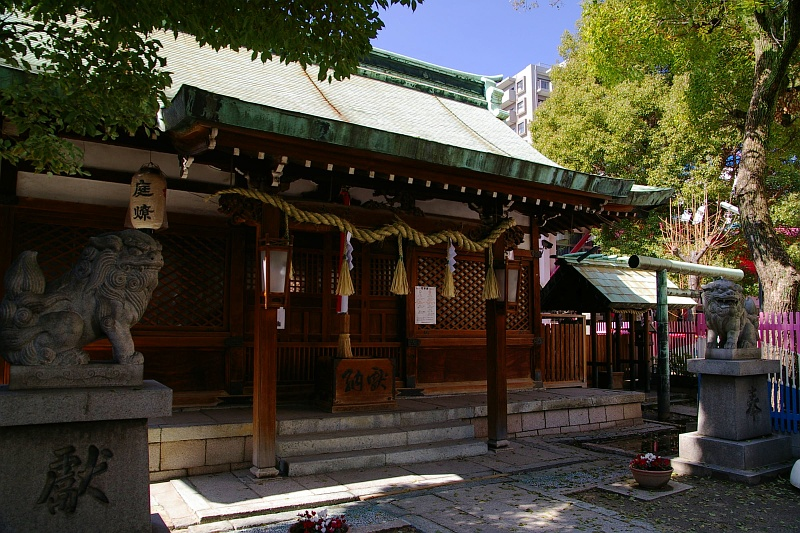 Tenjinsya (shrine), Fukushima-ku, Osaka City, Japan.